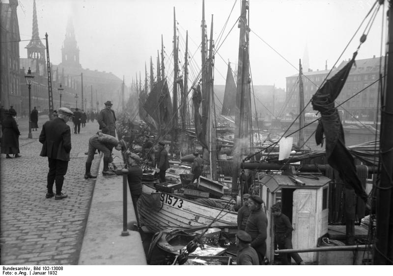 Fischmarkt in Kopenhagen ! Blick auf den Fischmarkt in der Nähe der Börse in Kopenhagen. Hunderte von Fischerbooten liegen an Markttagen am Kai im Inneren der Stadt und verkaufen hier ihre frisch gefangene Ware. Hunderte von kleinen Jollen am Markttage in Kopenhagen.